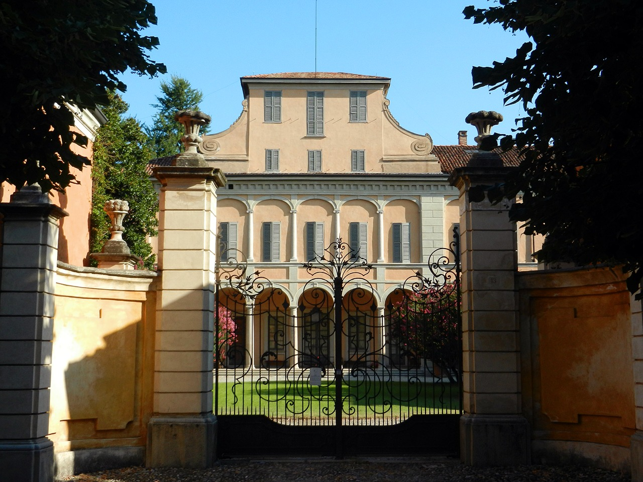 Bussero - Villa Sioli Legnani